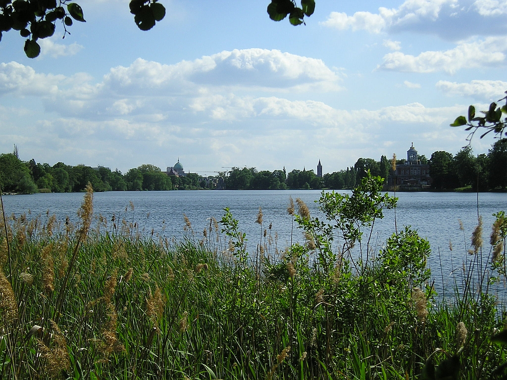 Der Heilige See in Potsdam. Blick vom Nordufer über den Heiligen See in Richtung Innenstadt. Gut zu erkennen sind die St. Nikolaikirche auf dem Alten Markt (links), die St. Peter und Paul Kirche auf dem Bassinplatz (Mitte) und das Marmor-Palais am Westufer des Sees (rechts).